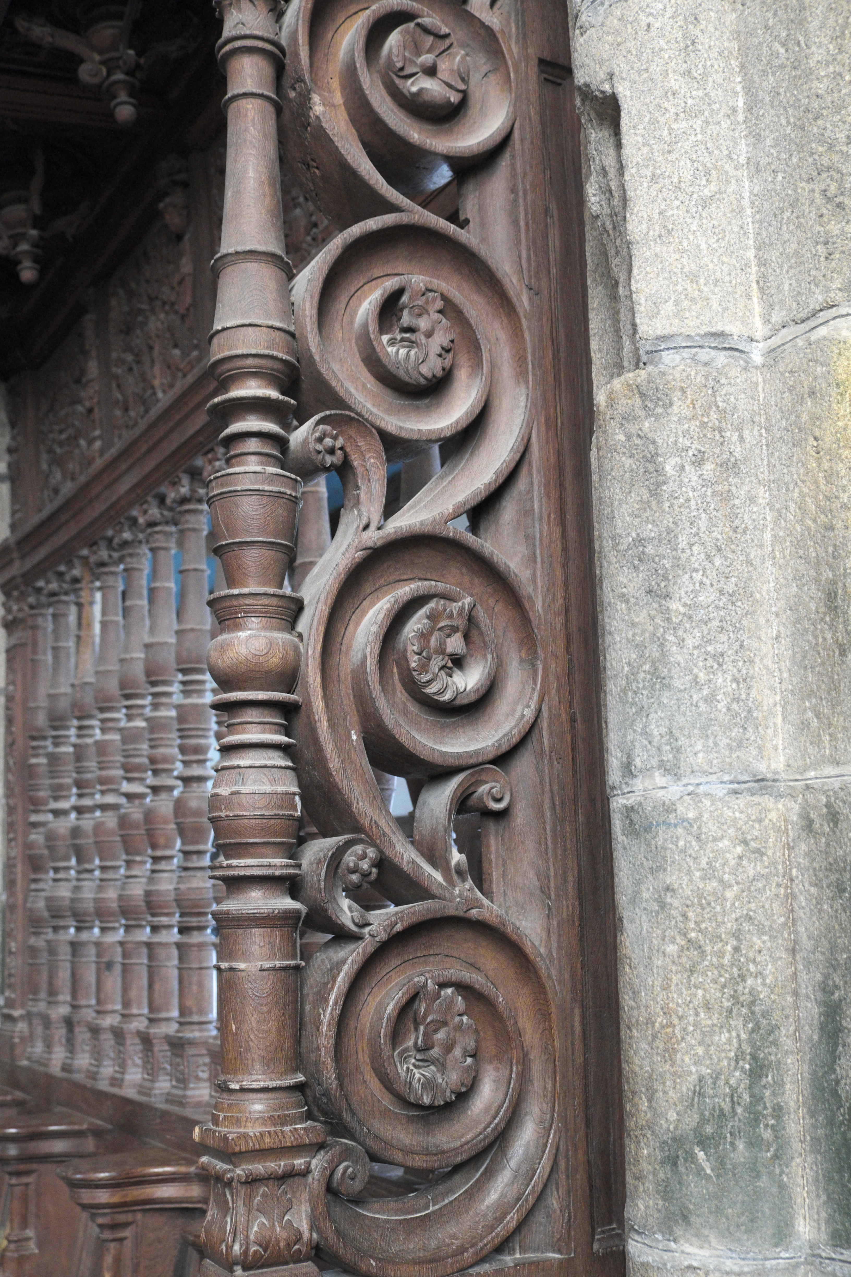 Kapelle Saint-Herbot in Saint-Herbot (Plonévez-du-Faou) im Département Finistère (Region Bretagne/Frankreich), Chorgestühl aus dem 16. Jahrhundert